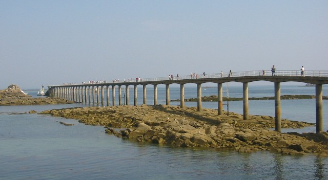 Flutanlegeplatz für die Fähre Ile de Batz-Roscoff